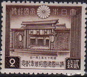 日本が満州国建国10周年記念切手として発行した郵便切手のうち、建国神廟を描く2銭切手。